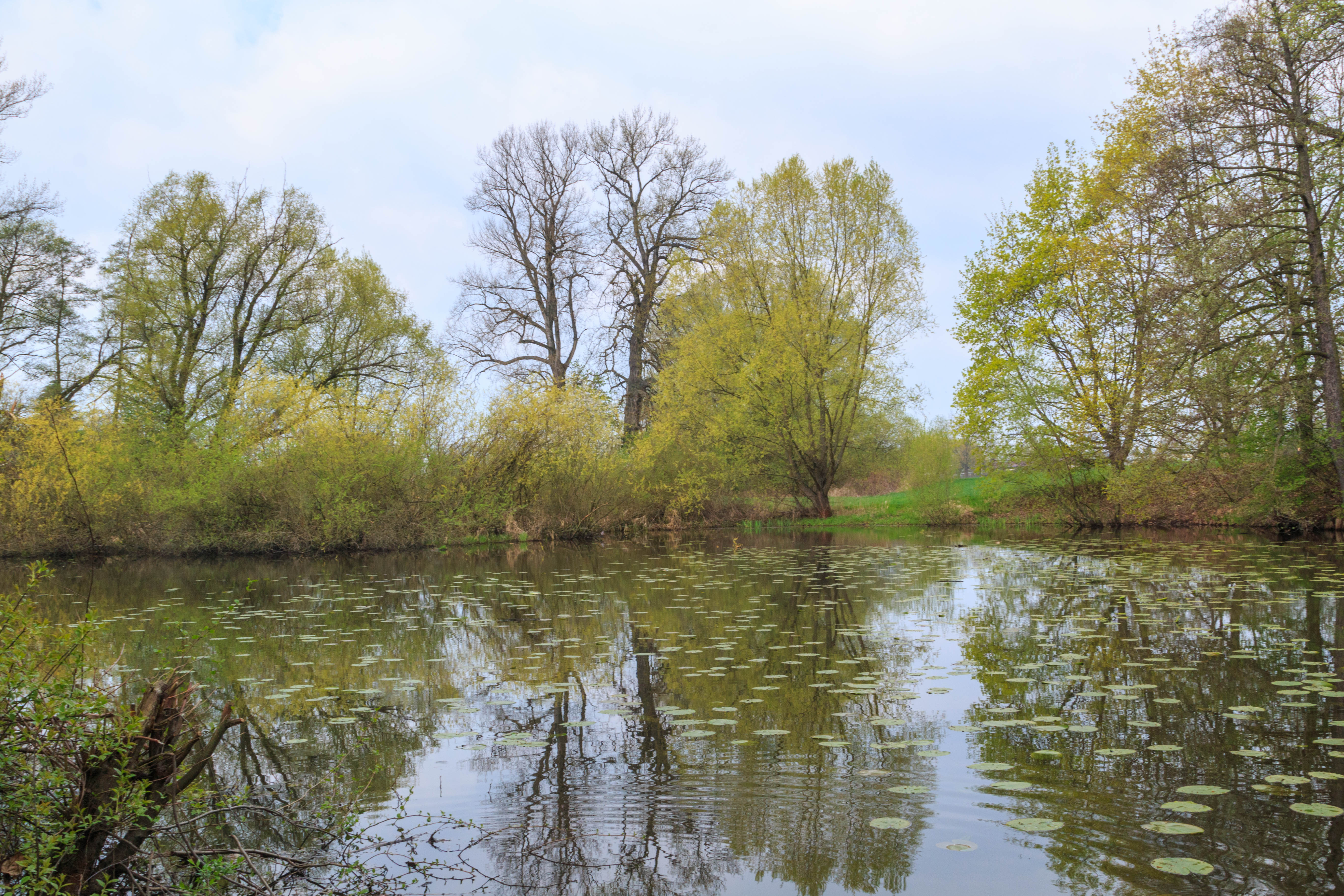 Staré rameno Labe u Hradce Králové Project: Vodstvo.